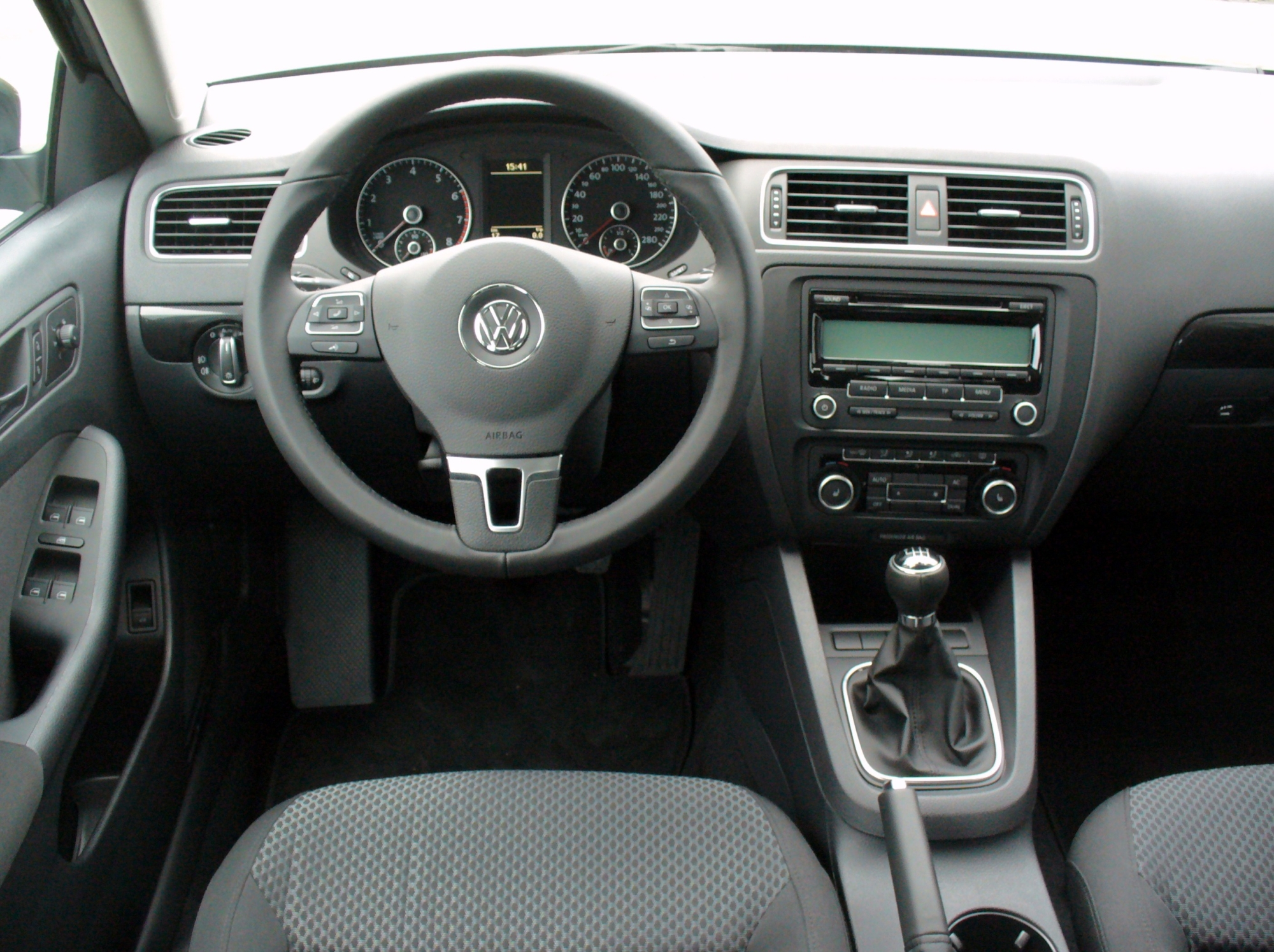 VW Jetta VI